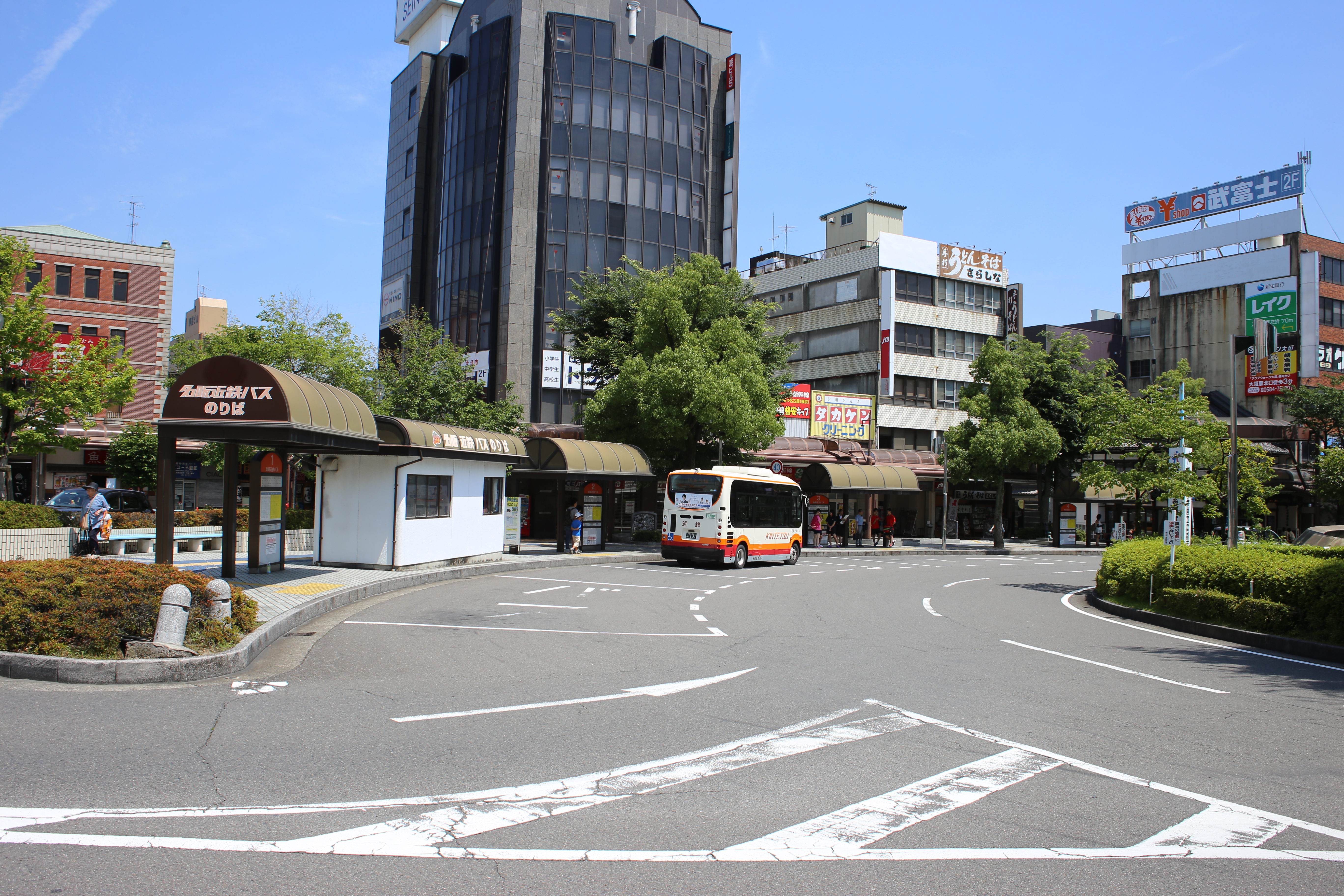 岐阜県大垣市の岐阜駅南口に所在するバスターミナルを北西側より撮影